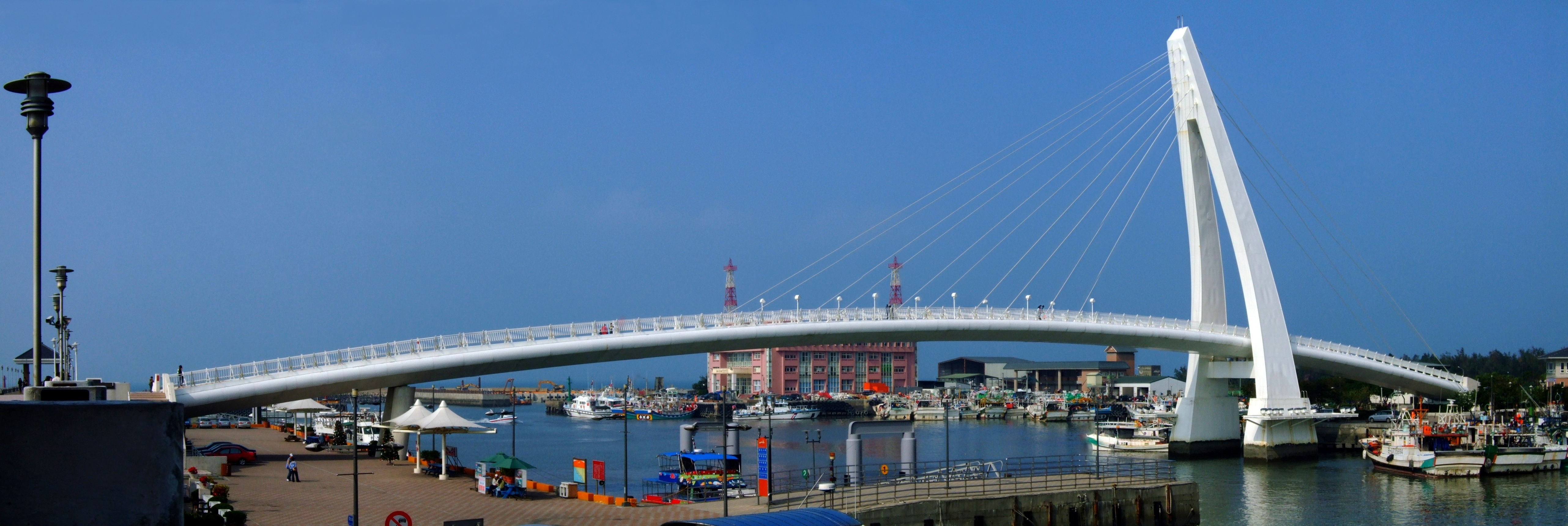 台灣淡水鎮漁人碼頭中的跨港斜張橋--情人橋。